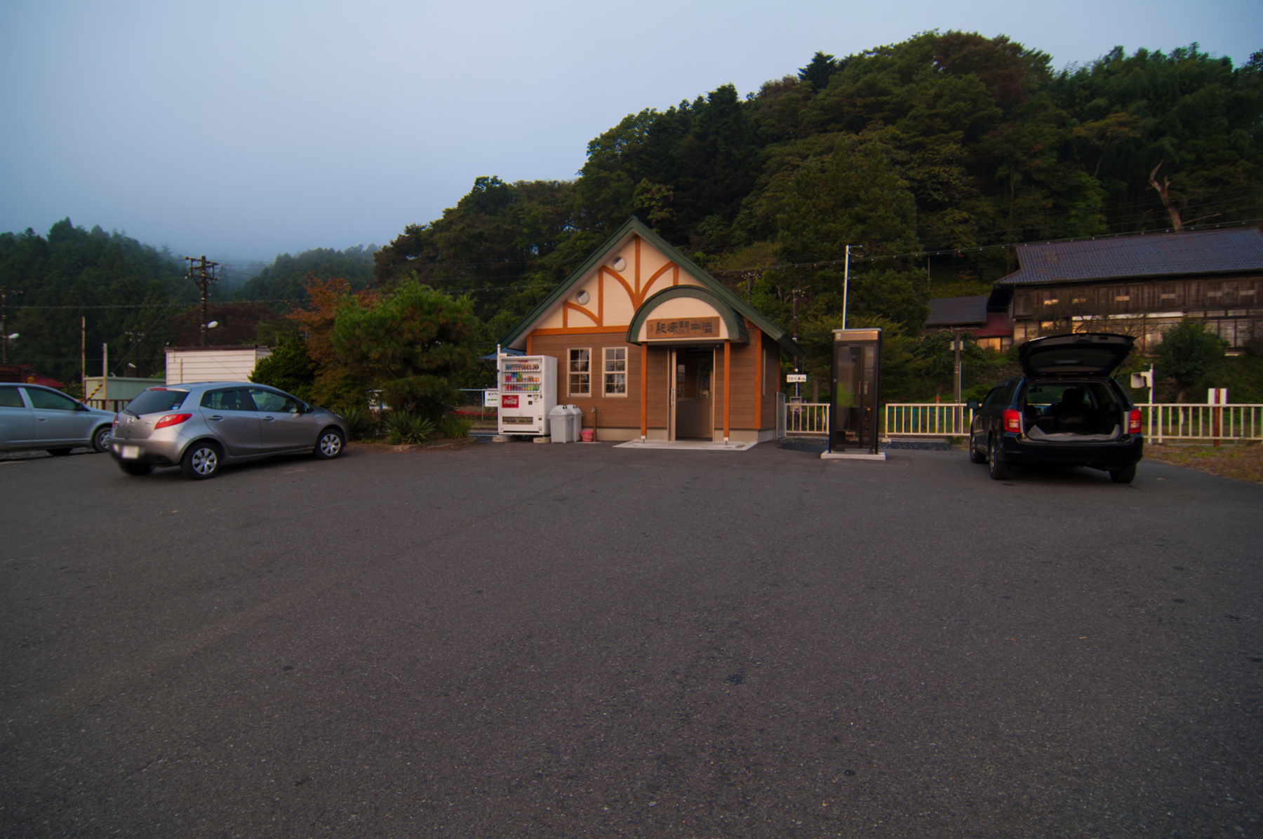 東日本旅客鉄道大船渡線陸中門崎駅